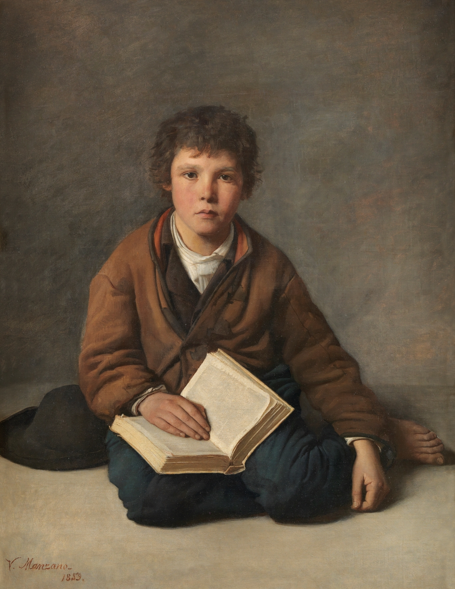 La obra representa a un niño sentado.